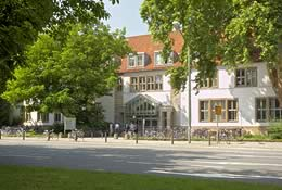 Ansicht Institut für Finanz- und Steuerrecht